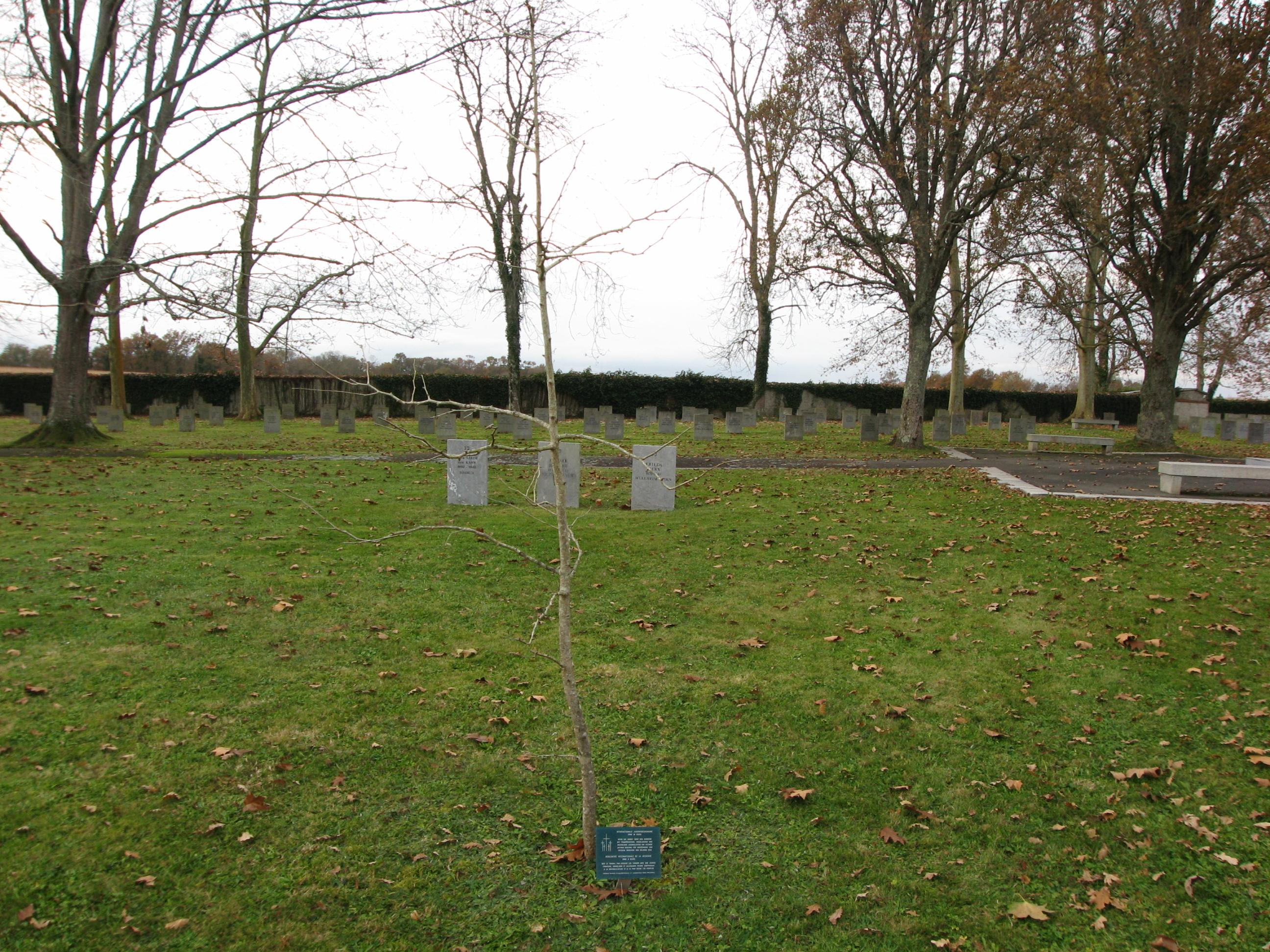 Arbre de la liberté planté à l'occasion de la "rencontre internationale de la jeunesse en 2000" (Gurs) (Pyrénées-Atlantiques) (Pyrénées).